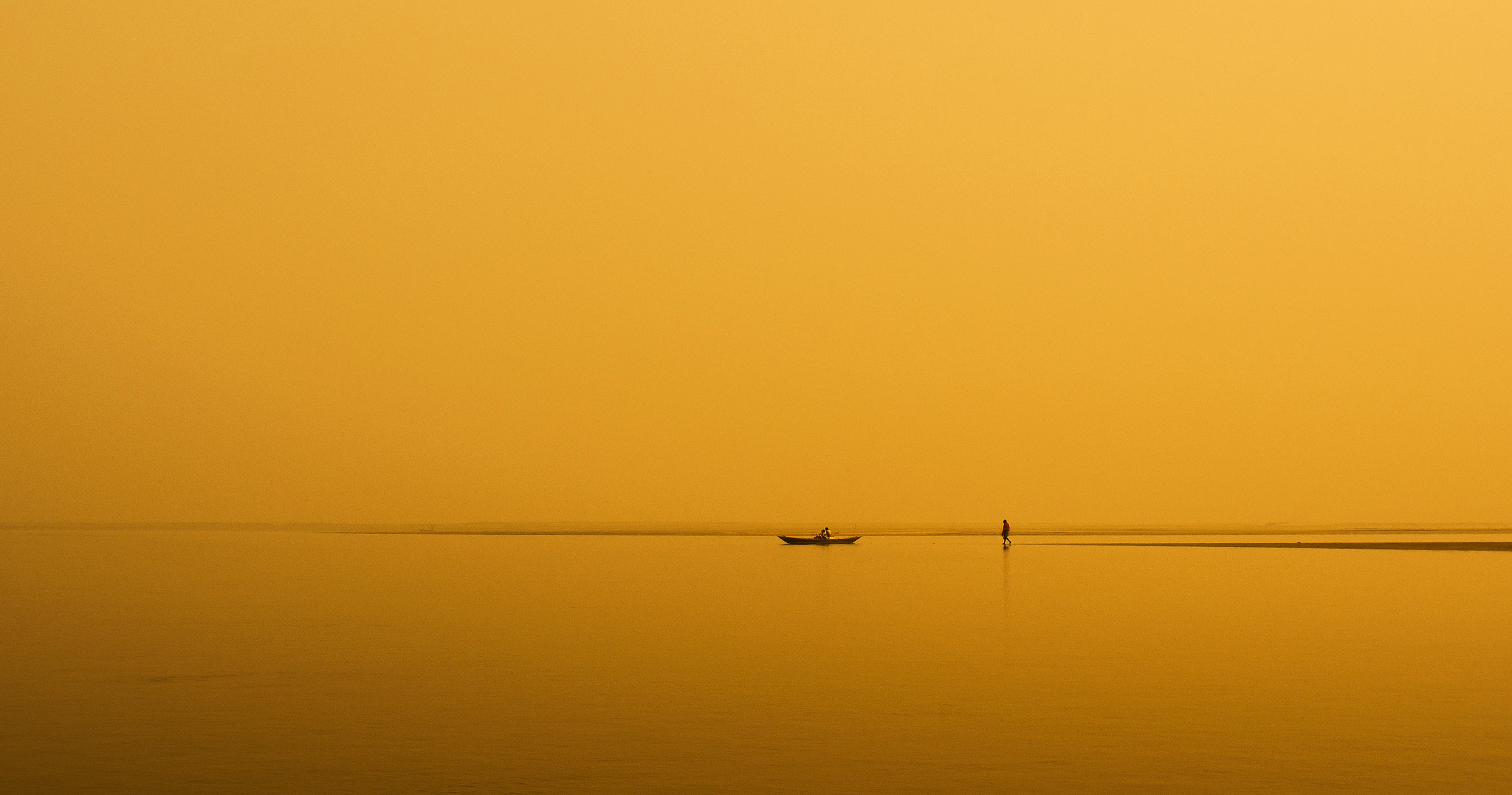 Minimalism......